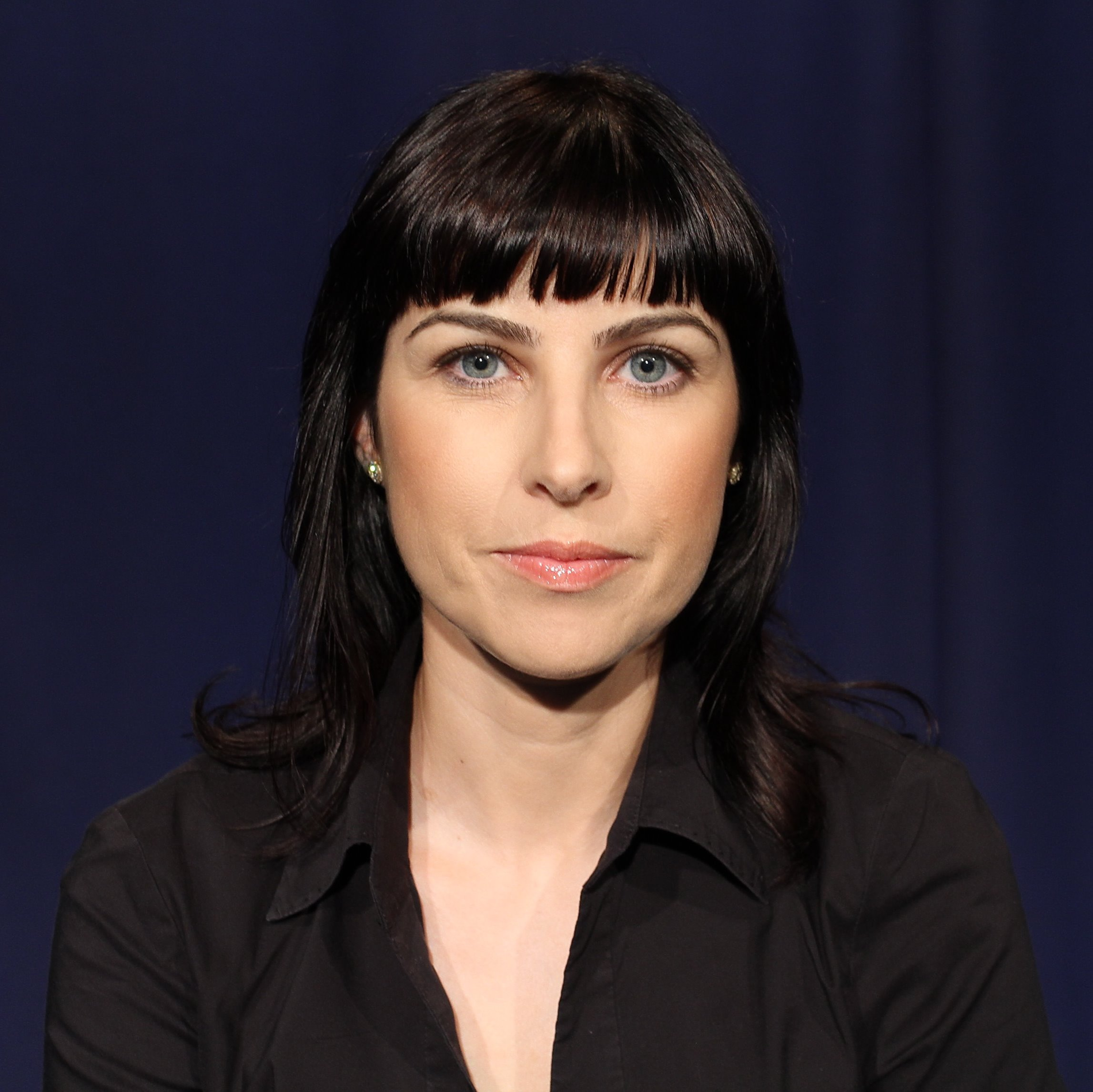 גאולה אבן